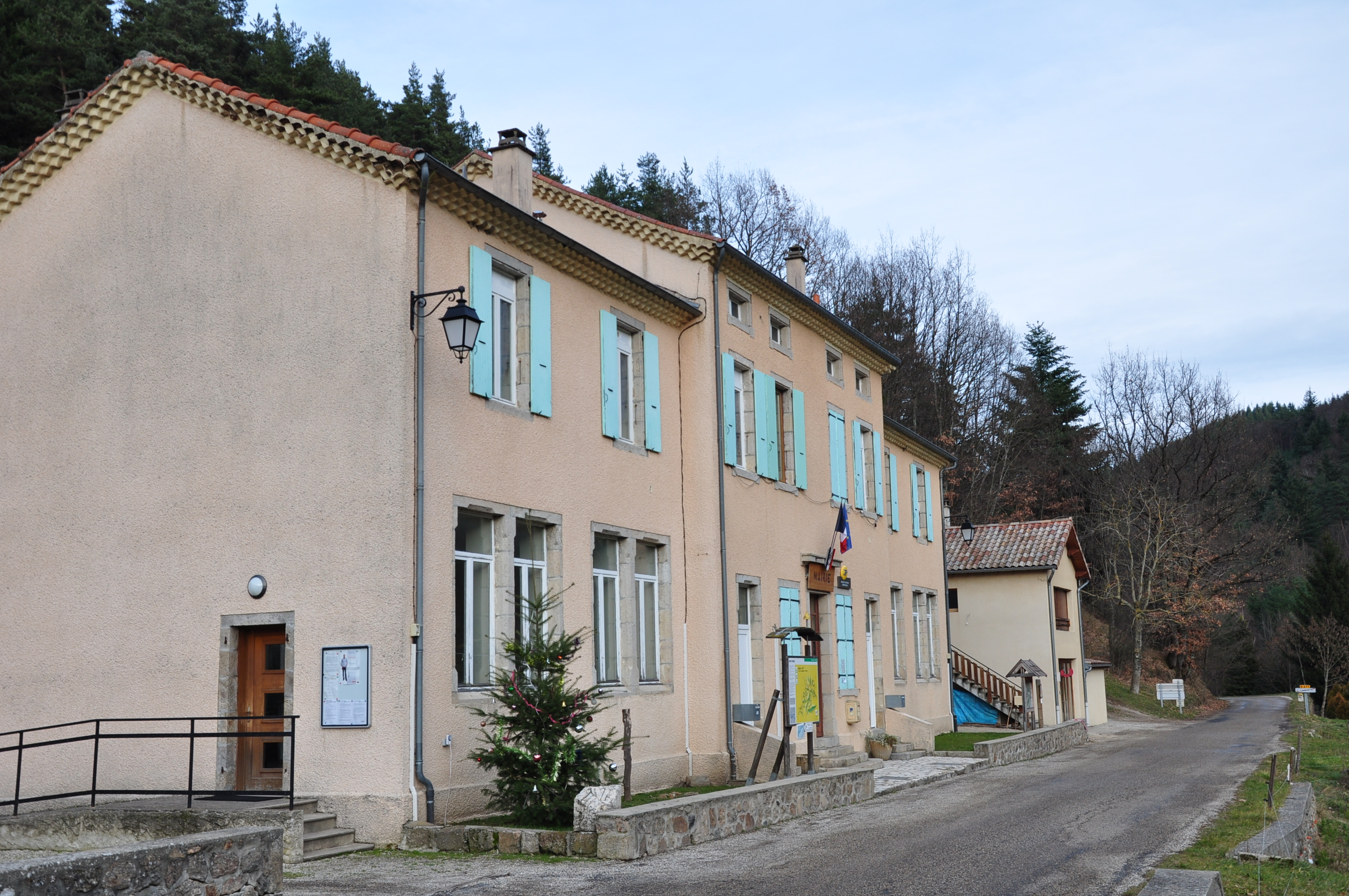 Mairie de Saint-Christol. Une pancarte indique : Saint-Christol Habitations de pierre et unité d'architecture caractérisent cette ère de part et d'autre du Talaron avec ces hameaux qui s'élèvent en chapelets. Forêts, pâturages, polyculture (petits druits), sont présents dans cette valée. La commune au XVIème et XVIIème siècles était en grande partie protestante. Saint-Christol se situe sur les traces de le route des dragonnades arrivant du hameau du Fau : axe principal utilisé jusqu'à la fin du XIXème siècle pour joindre Privas au Cheylard. La construction de cette route fut destinée à mieux contrôler les éventuelles révoltes des pays protestants et incidemment à développer le commerce. Vous entrez sur le réseau de randonnée du Canton du Cheylard. Vous pouvez parcourir ses sentiers et chemibns à pied, ou en VTT. Pour votre confort et votre sécurité, ce réseau est balisé et jalonné d'informations directionnelles. Le balisage est assuré par deux traits de peinture : blanc et rouge pour les sentiers de Grande Randonnée GR, blanc et jaune une pour tous les autres sentiers. En suivant les sentiers ainsi balisés, vous rejoindrez des embranchements équipés de panneaux surmontés d'un cône jaune... pour ne pas perdre le nord ! Aux carrefours les plus importants, vous trouverez également un plan du réseau pour mieux vous situer, et au grès du chemin les panneaux "site". Pour toures informations Office de Tourisme du Cheylard Tél : 04 75 29 18 71